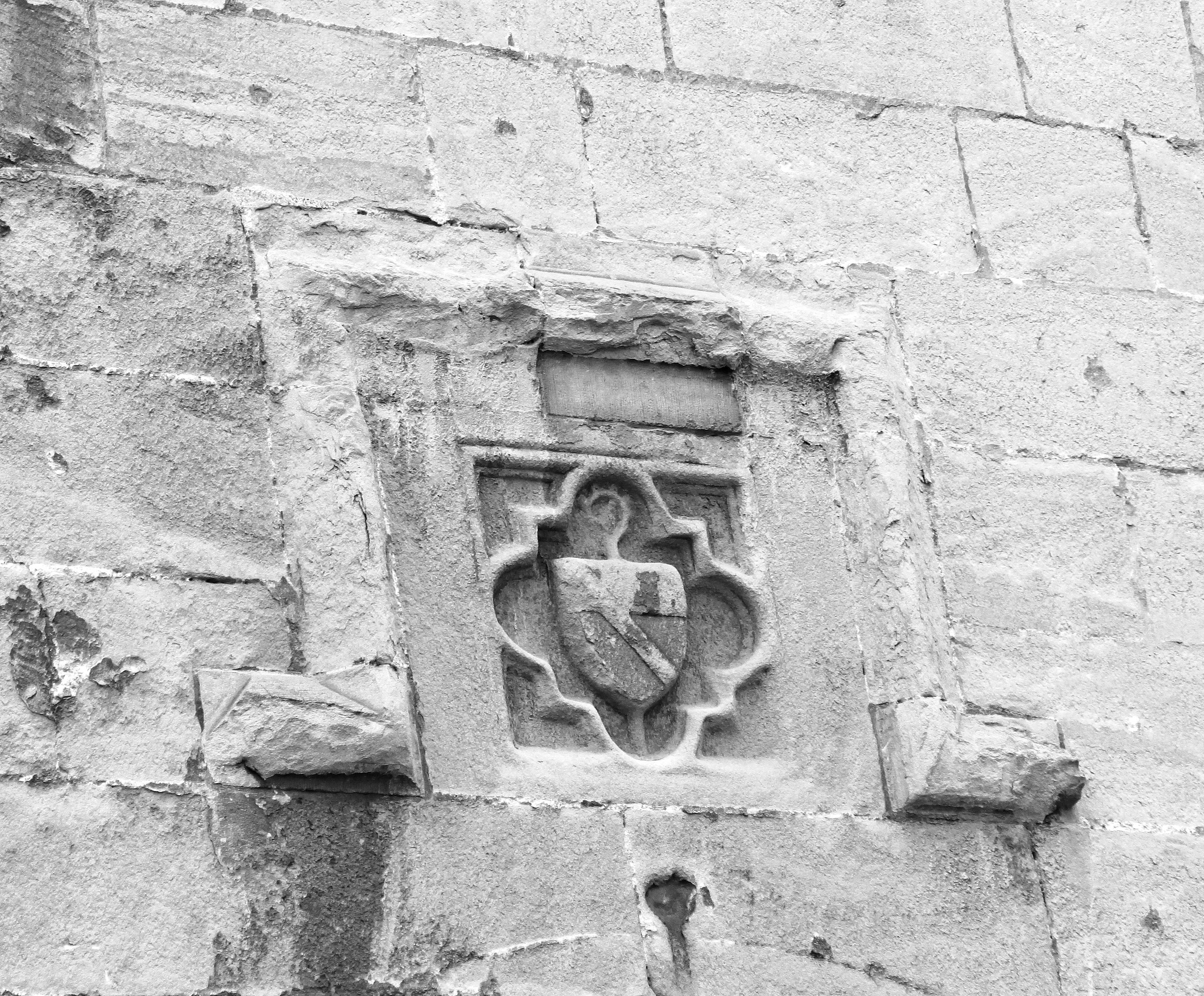 Suisse, canton de Vaud, Lausanne, Château Saint-Maire. Construit dès 1396 pour devenir la résidence des Evêques. Aujourd'hui, siège du gouvernement. Ne se visite pas. Classé depuis 1920. Vue des pierres de taille (molasse), rue de la Barre.